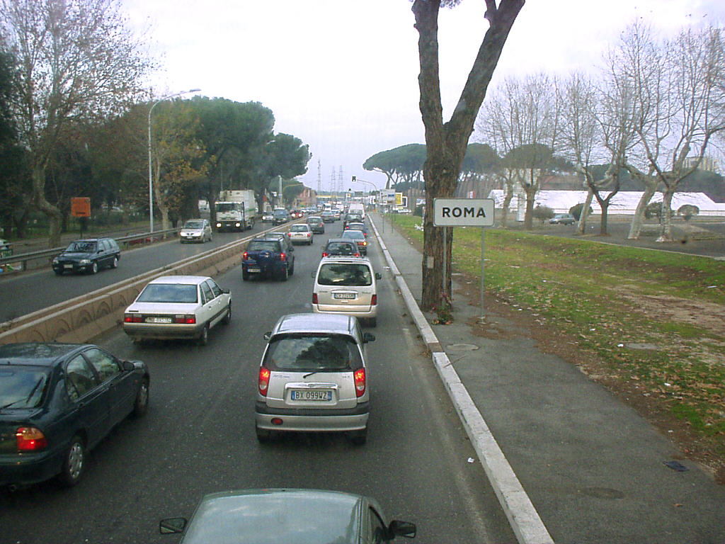 Südl. Einfallstrasse Via Appia Nuova nördl. Ciampino